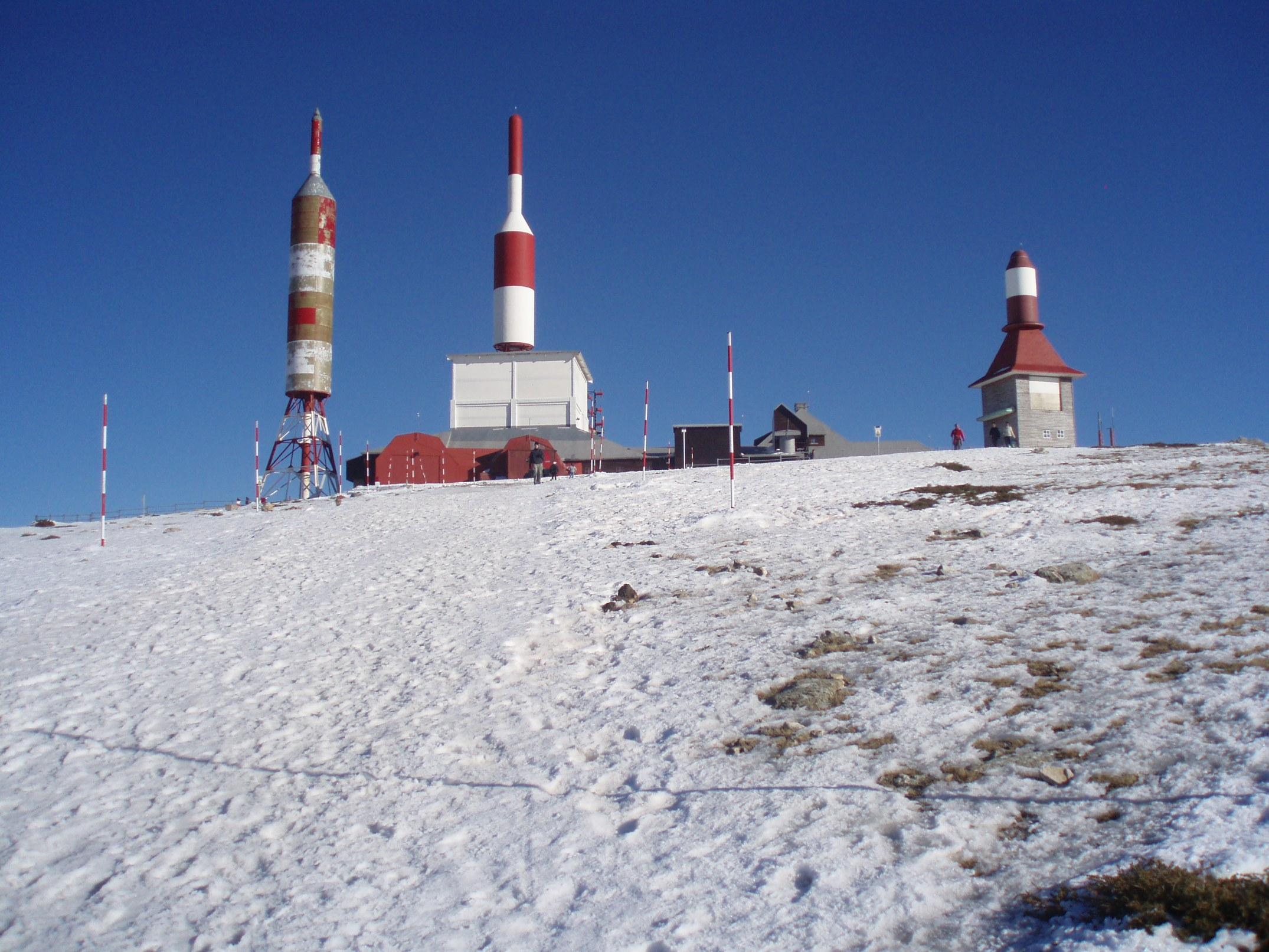 Antenas de televisión de la cima de la Bola del Mundo (Sierra de Guadarrama, España).